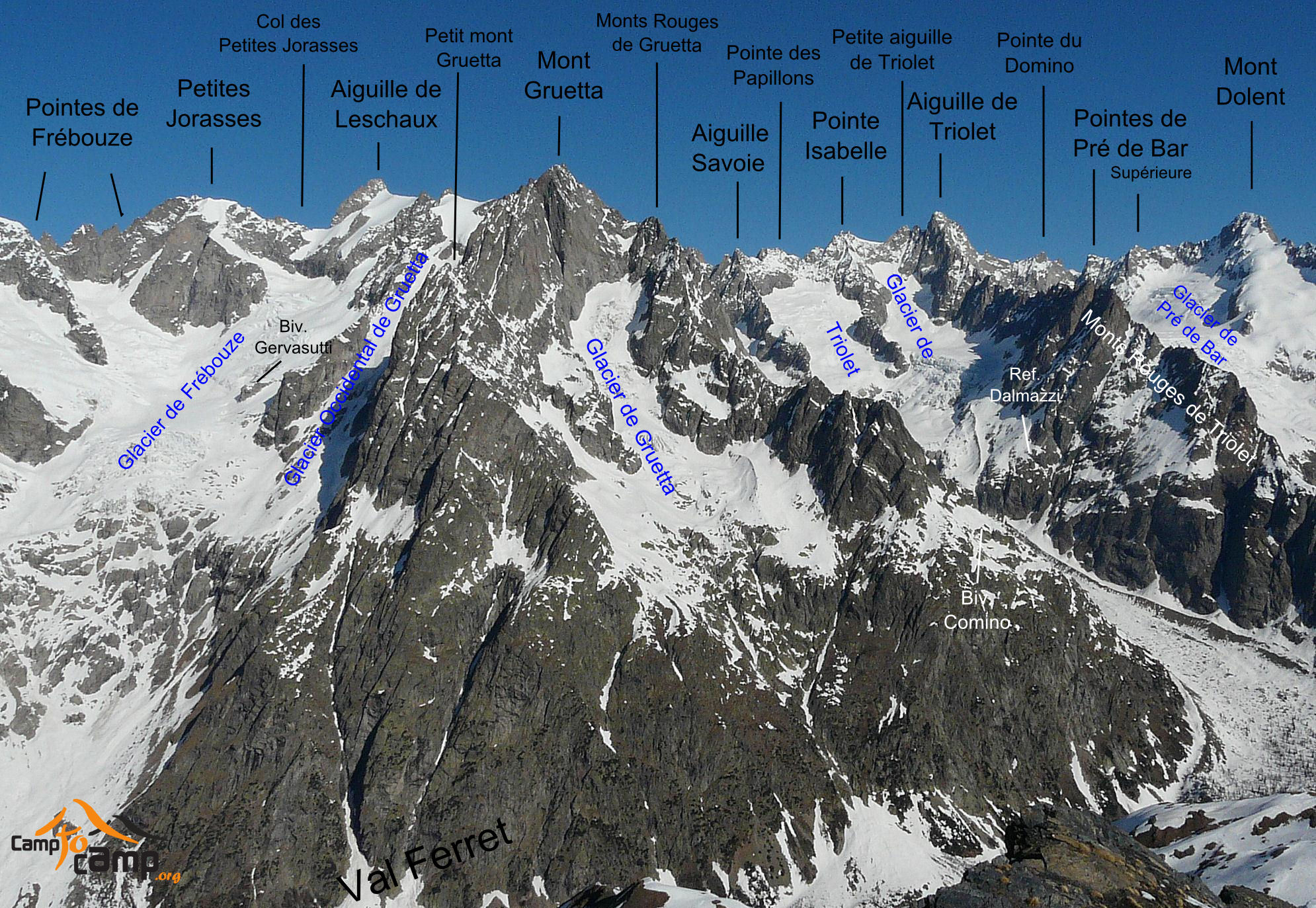 Versante italiano del massiccio del monte bianco dalle Petite Jorasses al Mont Dolent